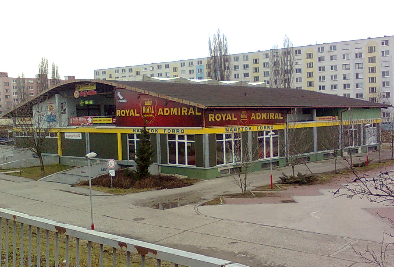 Šaľa polyfunkčná tržnica